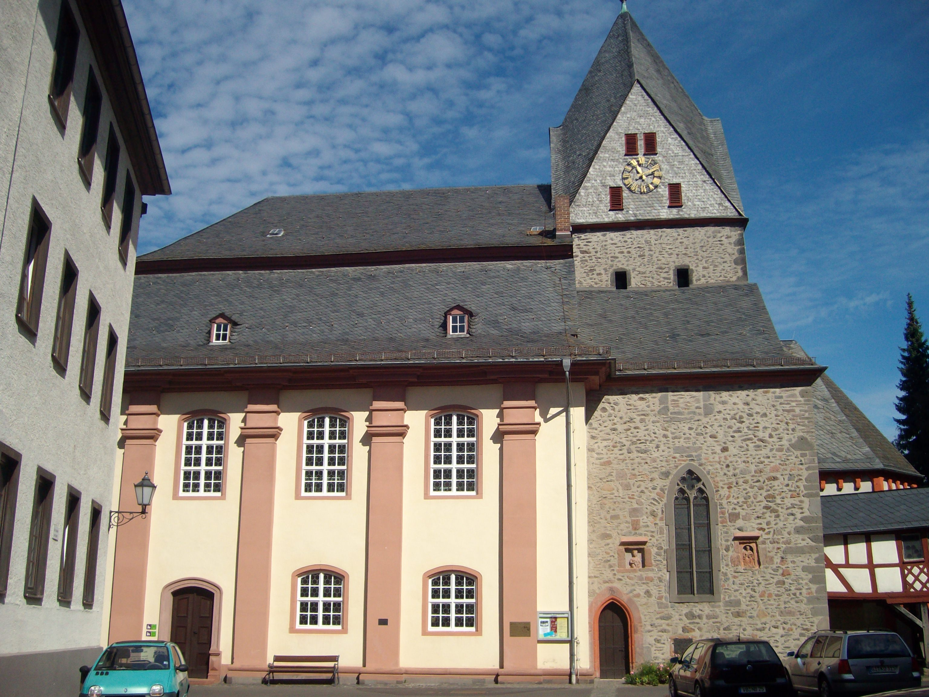 Evang. Stadtkirche in Laubach, Hessen